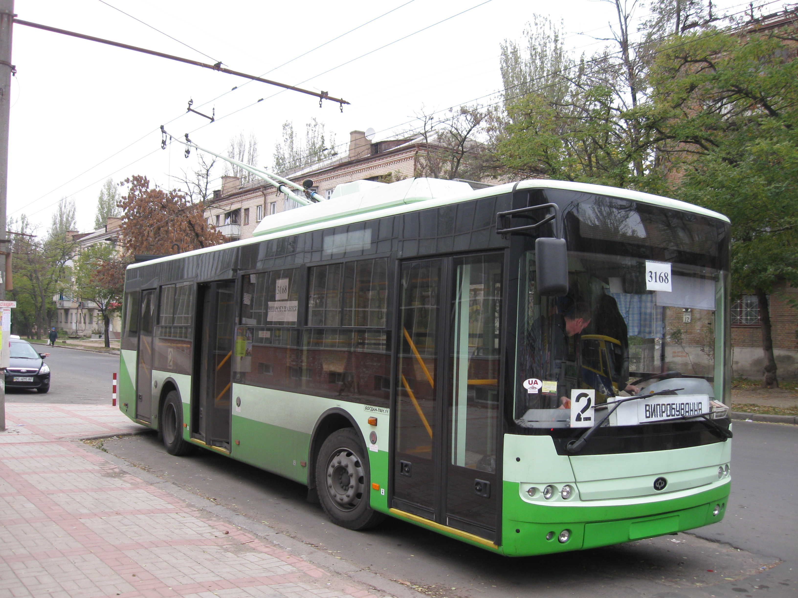 Троллейбус "Богдан Т60111" на випробуваннях в Миколаєві восени 2009 року